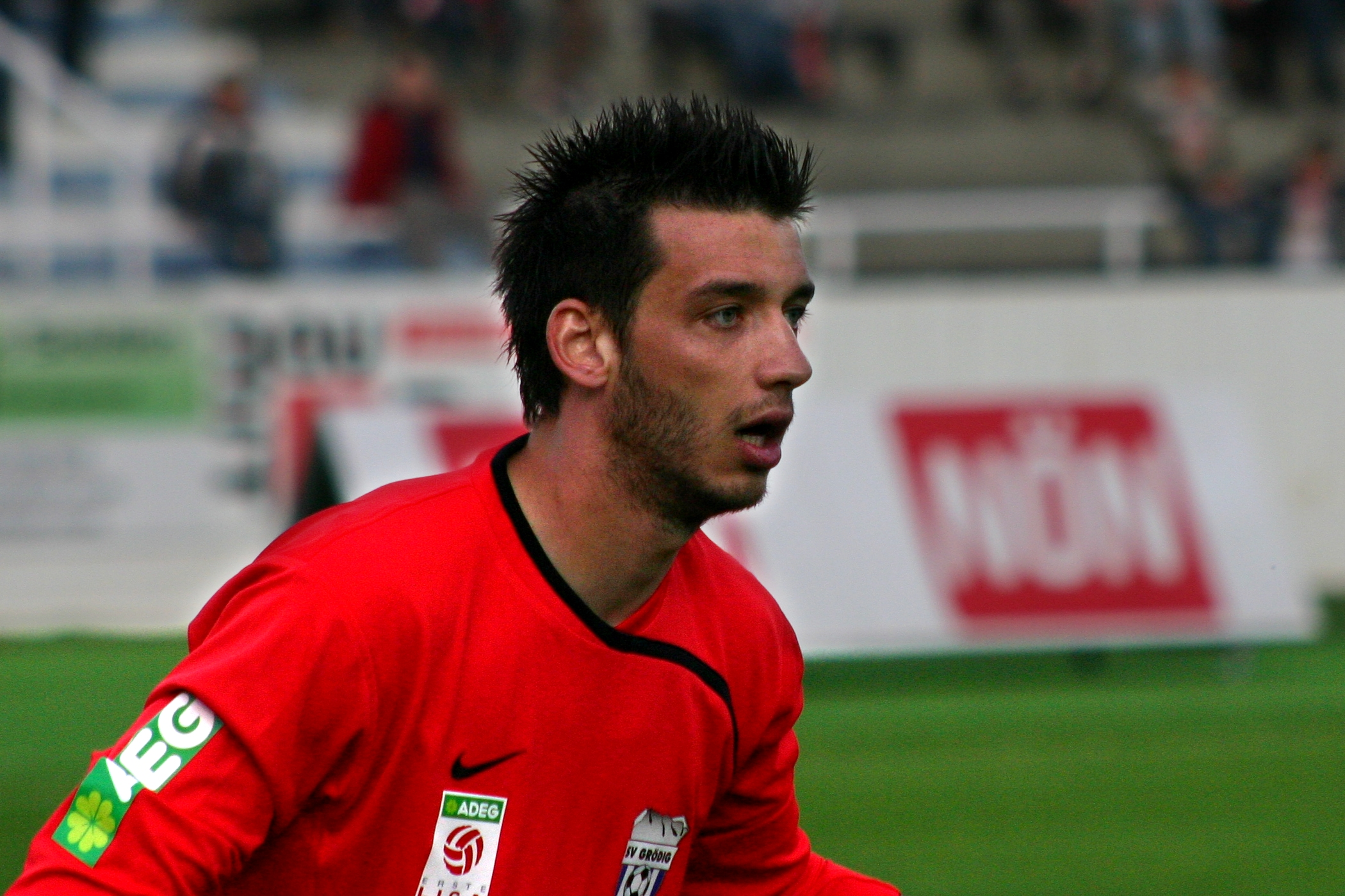 Bartolomej Kuru, Fußballtorwart - SV Grödig